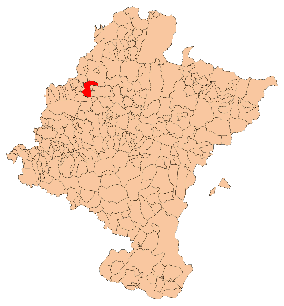 Uharte Arakil Nafarroako mapan kokatua.